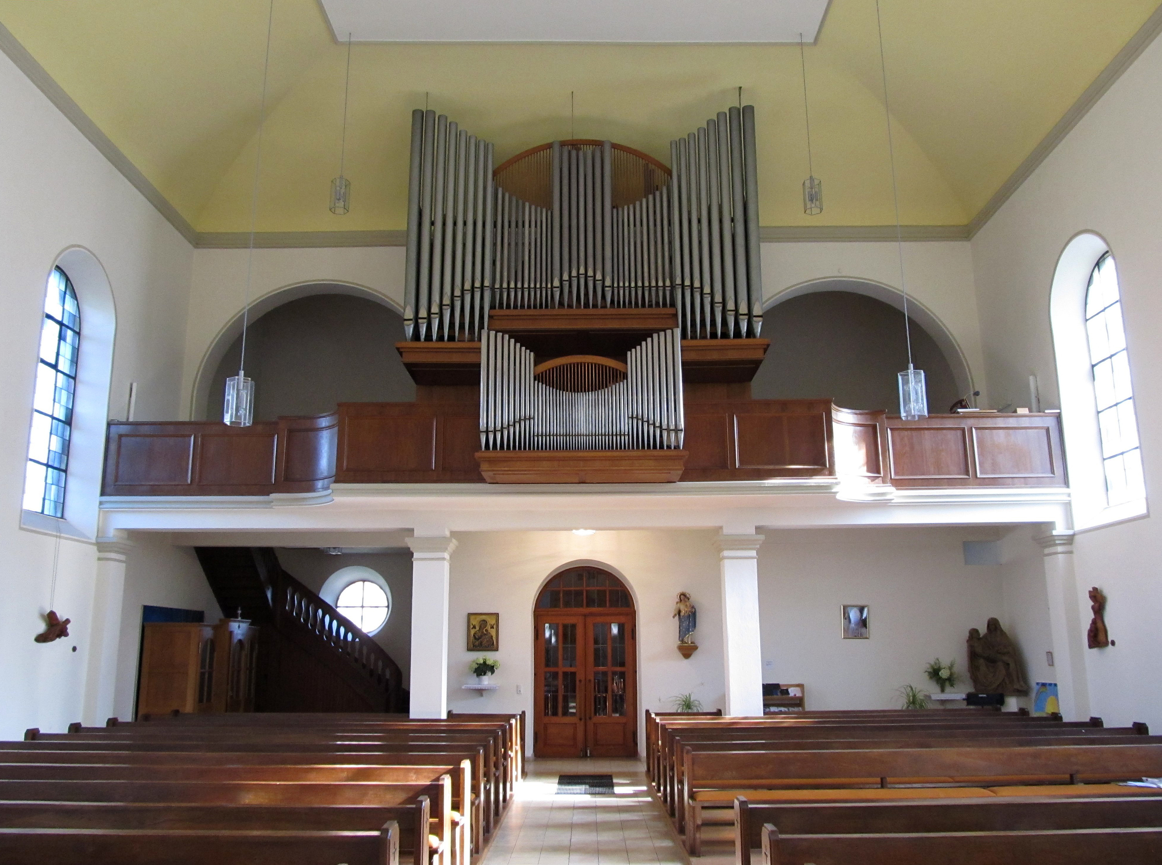 Blick ins Innere der katholischen Pfarrkirche St. Alban in Gersheim, Saarland